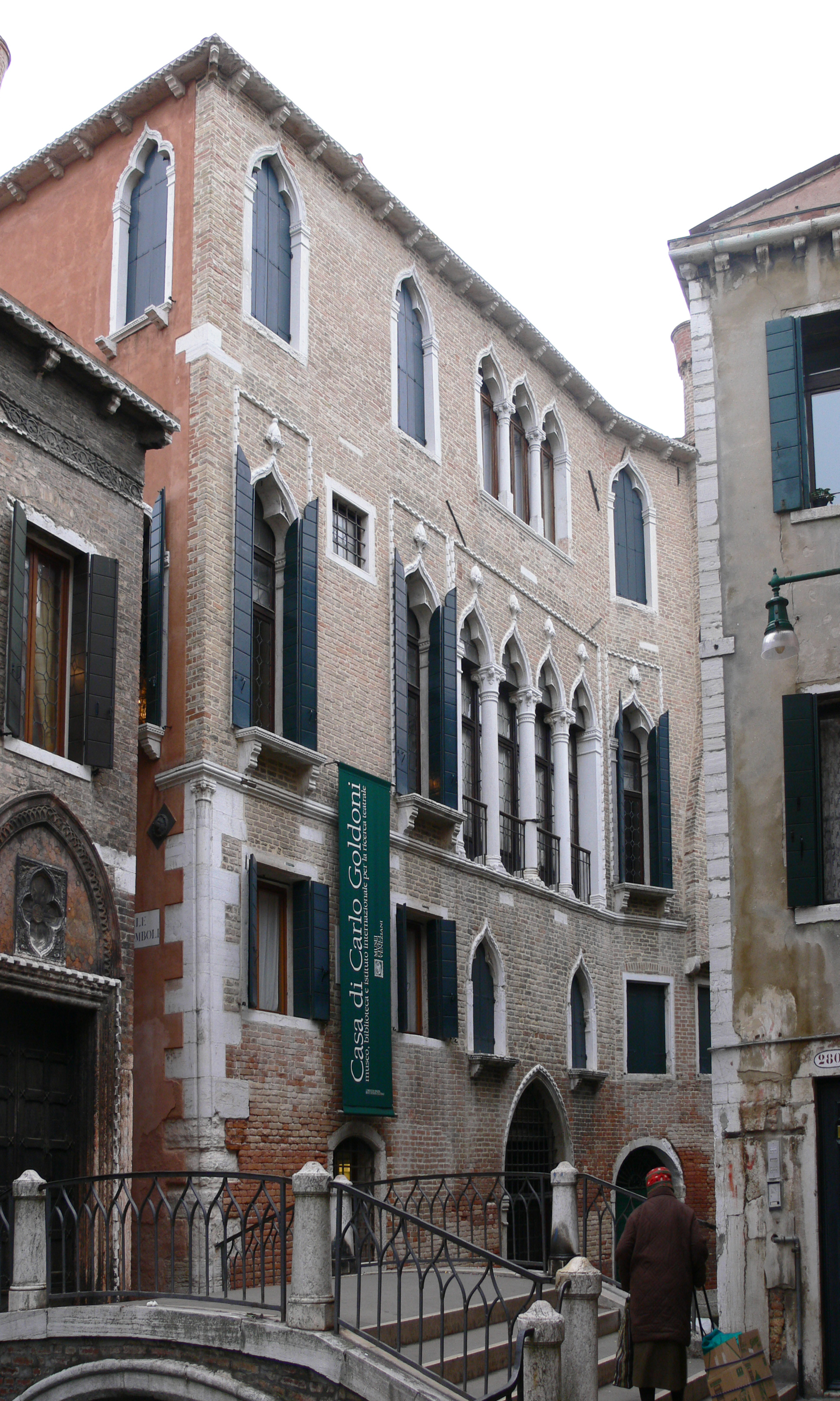 Casa Goldoni, Venezia, Italy